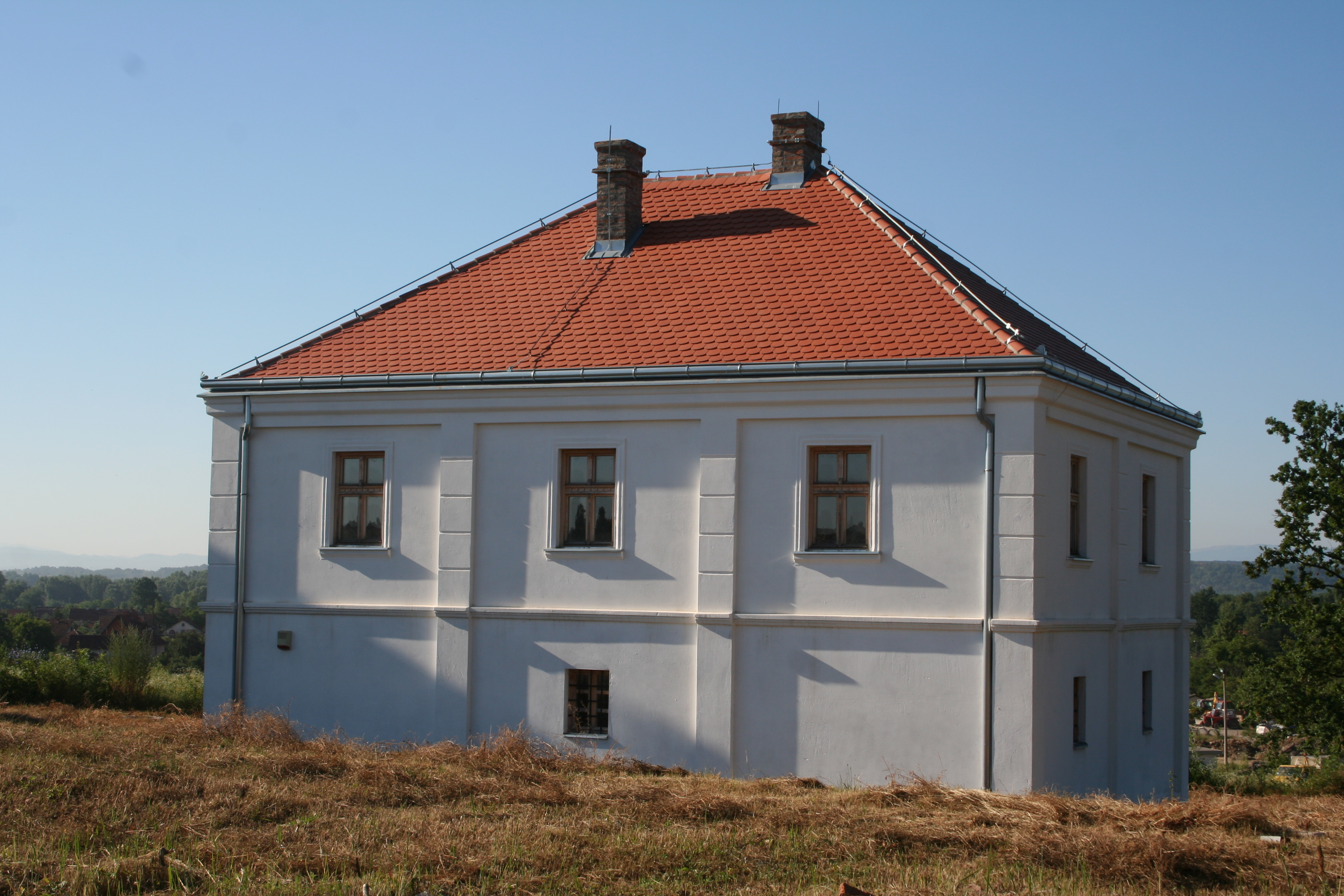 Konaci Radića i Brene Mihajlović (preseljeni iz Malog Borka u Lajkovac)